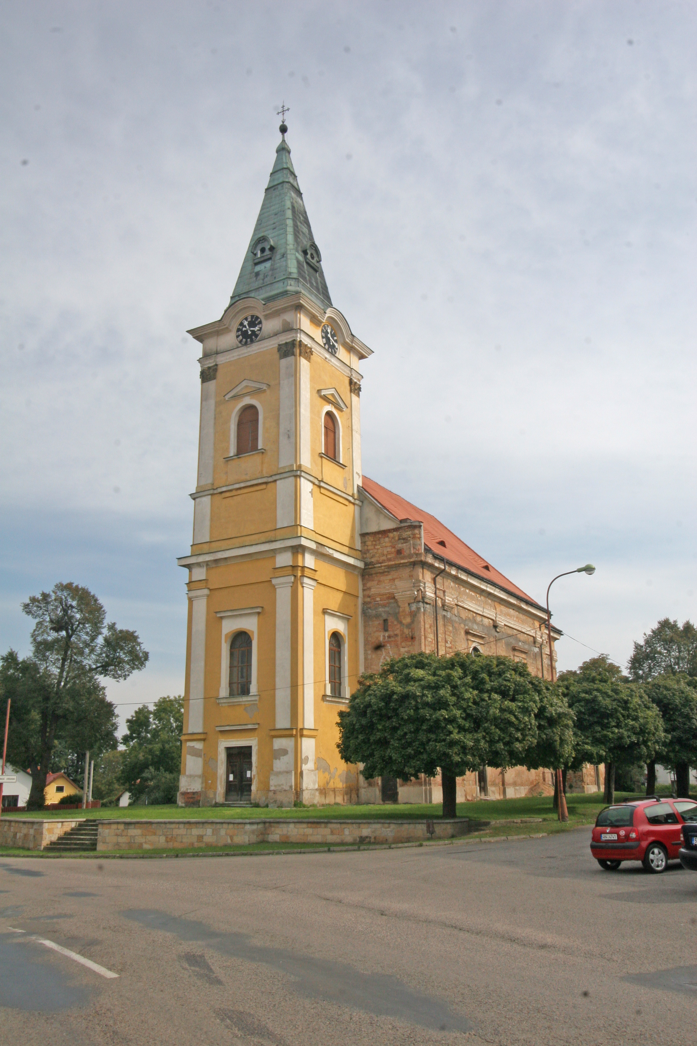 Kostel sv. Stanislava (Smidary), náves, Smidary